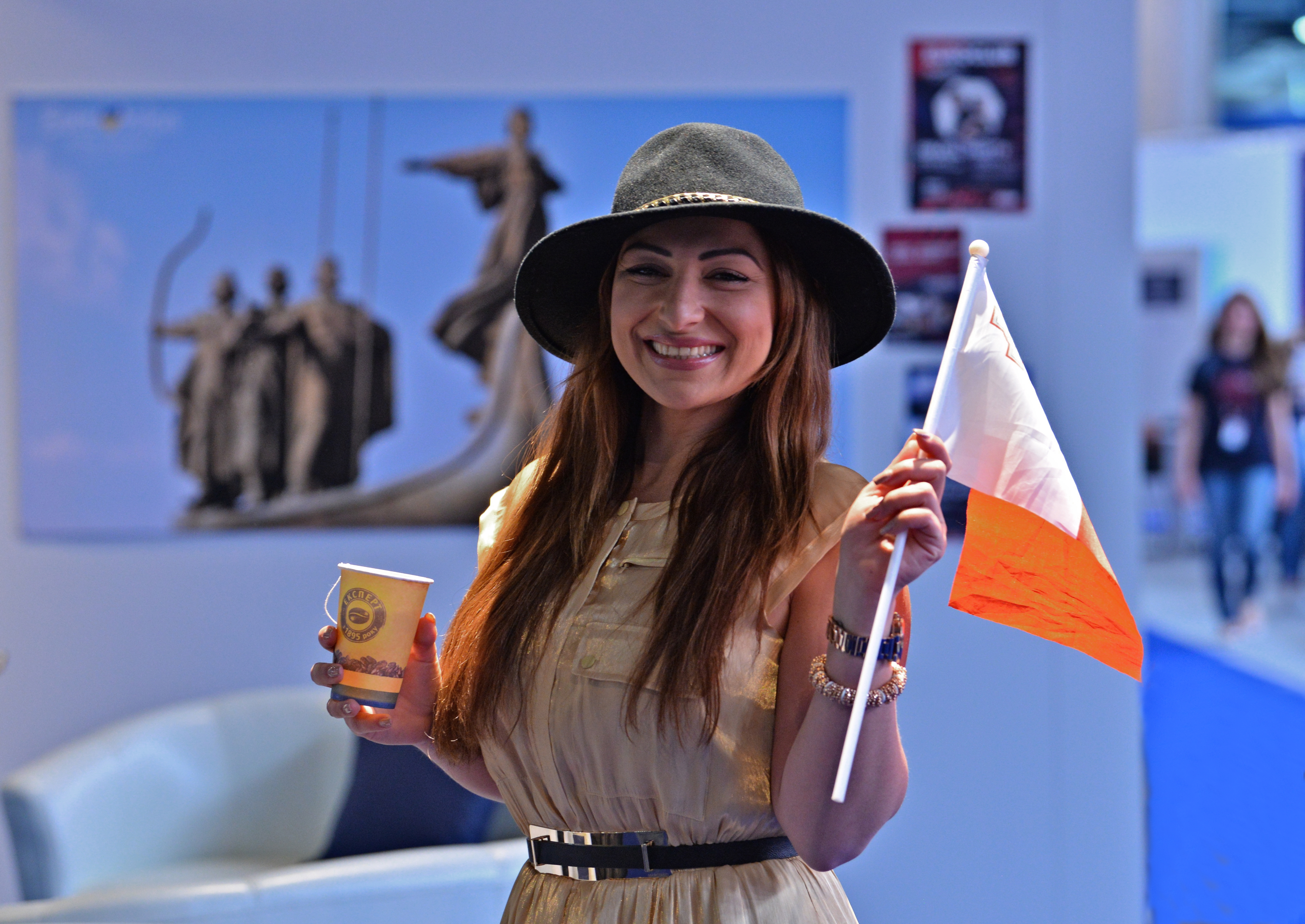 Мальтійська співачка Клавдія Фаньєлло у прес-центрі пісенного конкурсу Євробачення в Києві 2017